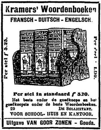 Advertentie voor Kramers' woordenboeken in het NRC.